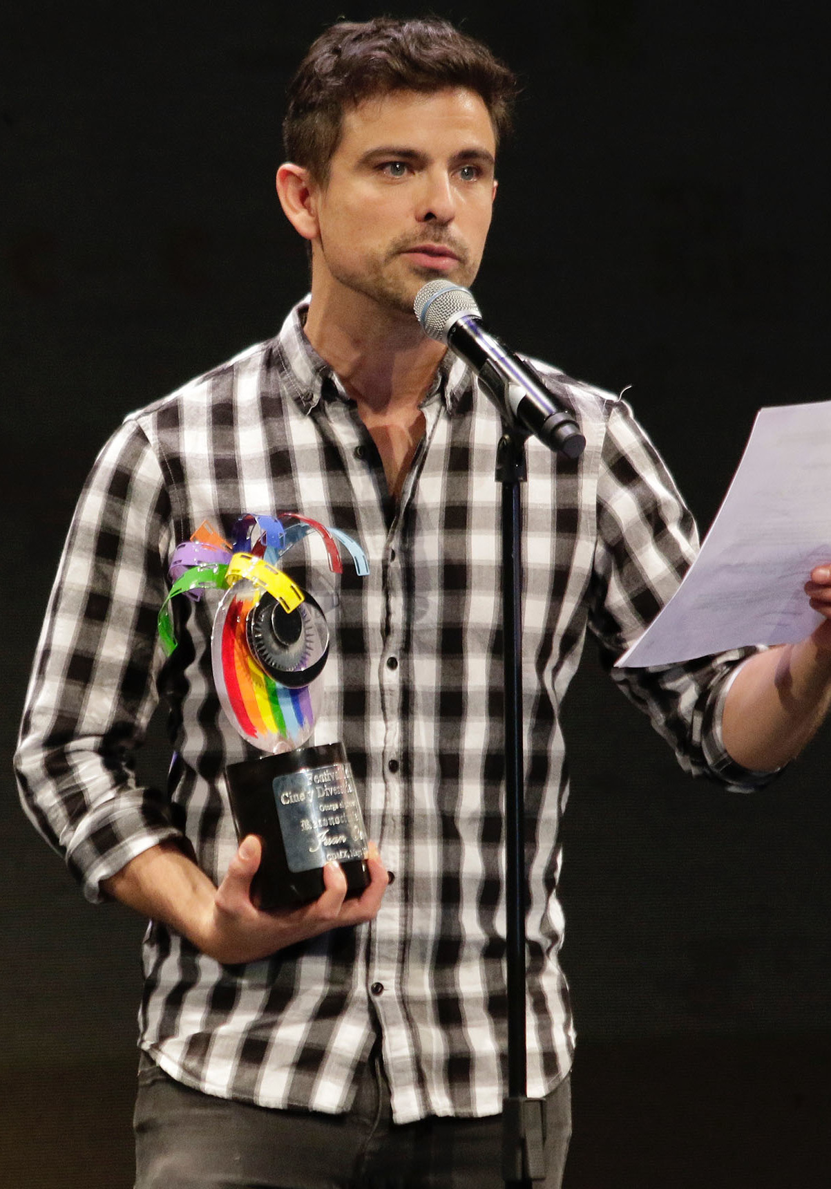 Teatro de la Ciudad Esperanza Iris inició el 23 Festival Mix: Cine y Diversidad Sexual con la entrega de varios reconocimientos uno a la actriz Ofelia Medina a cargo de José Alfonso Suárez del Real, secretario de Cultura de la Ciudad de México, otro a al productor de la serie Aristemo Juan Osorio y a los actores Emilio Osorio y Joaquín Bondoni, además se proyectaron las cintas Disturbio (Riot, Australia), de Jeffrey Walker, y Déjennos brillar (México) de Héctor Torres.